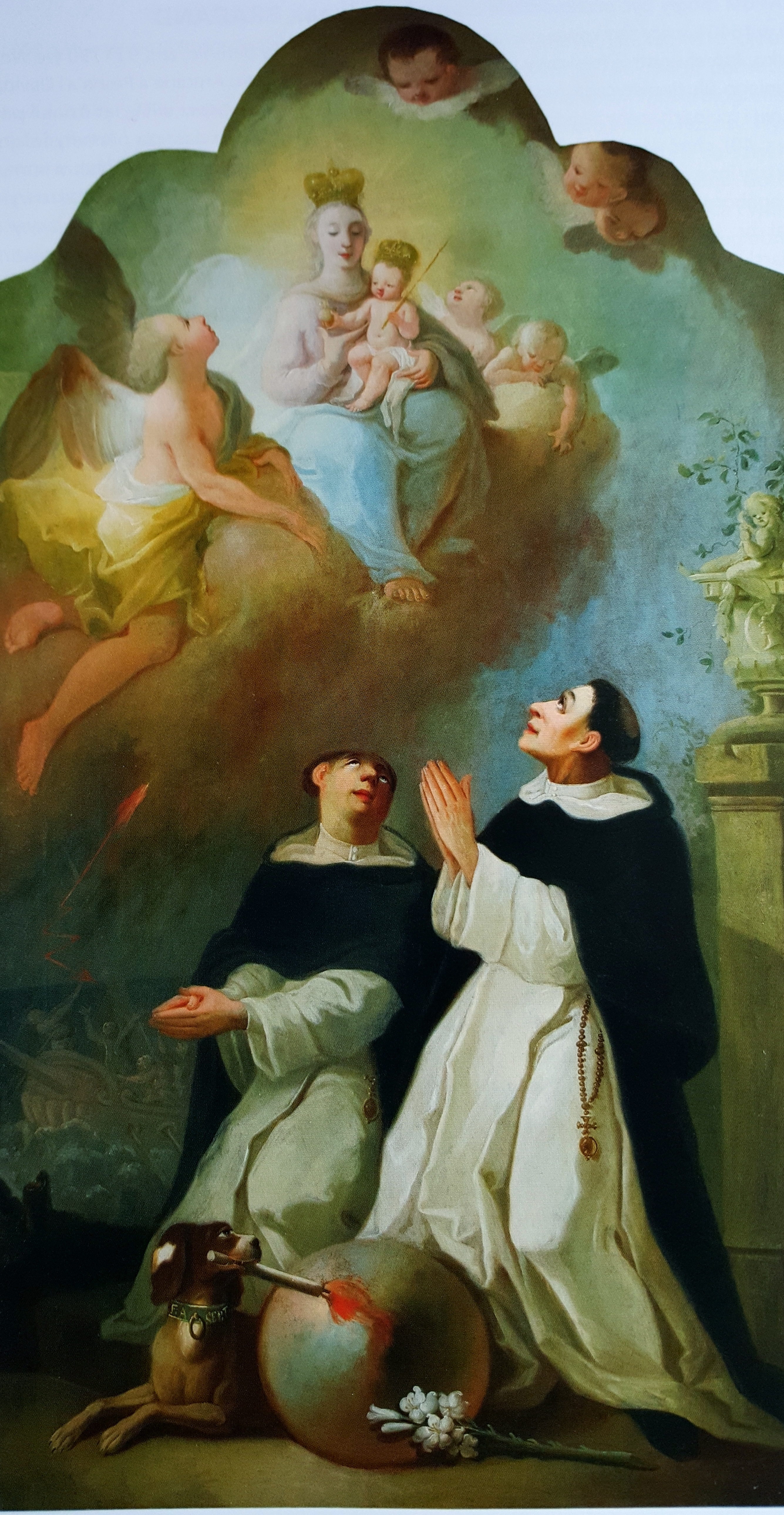 Franz Anton Sebastini, Madonna Różańcowa z Dominikami, 1775-1781, Muzeum Narodowe z Wrocławia